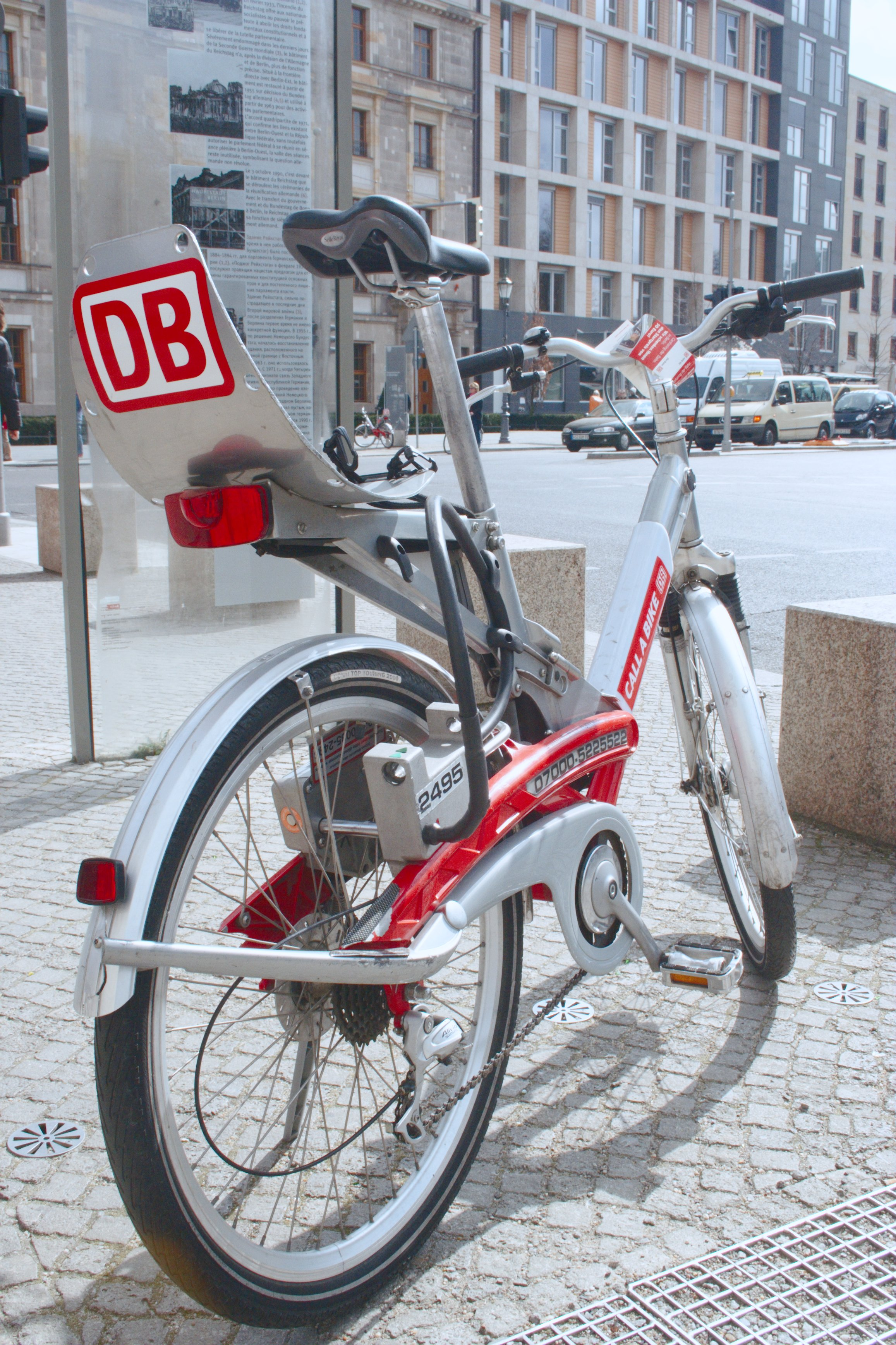 Call-a-Bike Bike of Deutsche Bahn in Berlin.